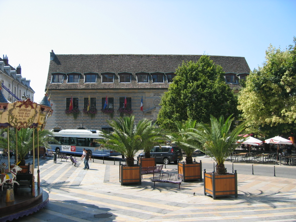 Hôtel de Ville de Besançon - Franche Comté